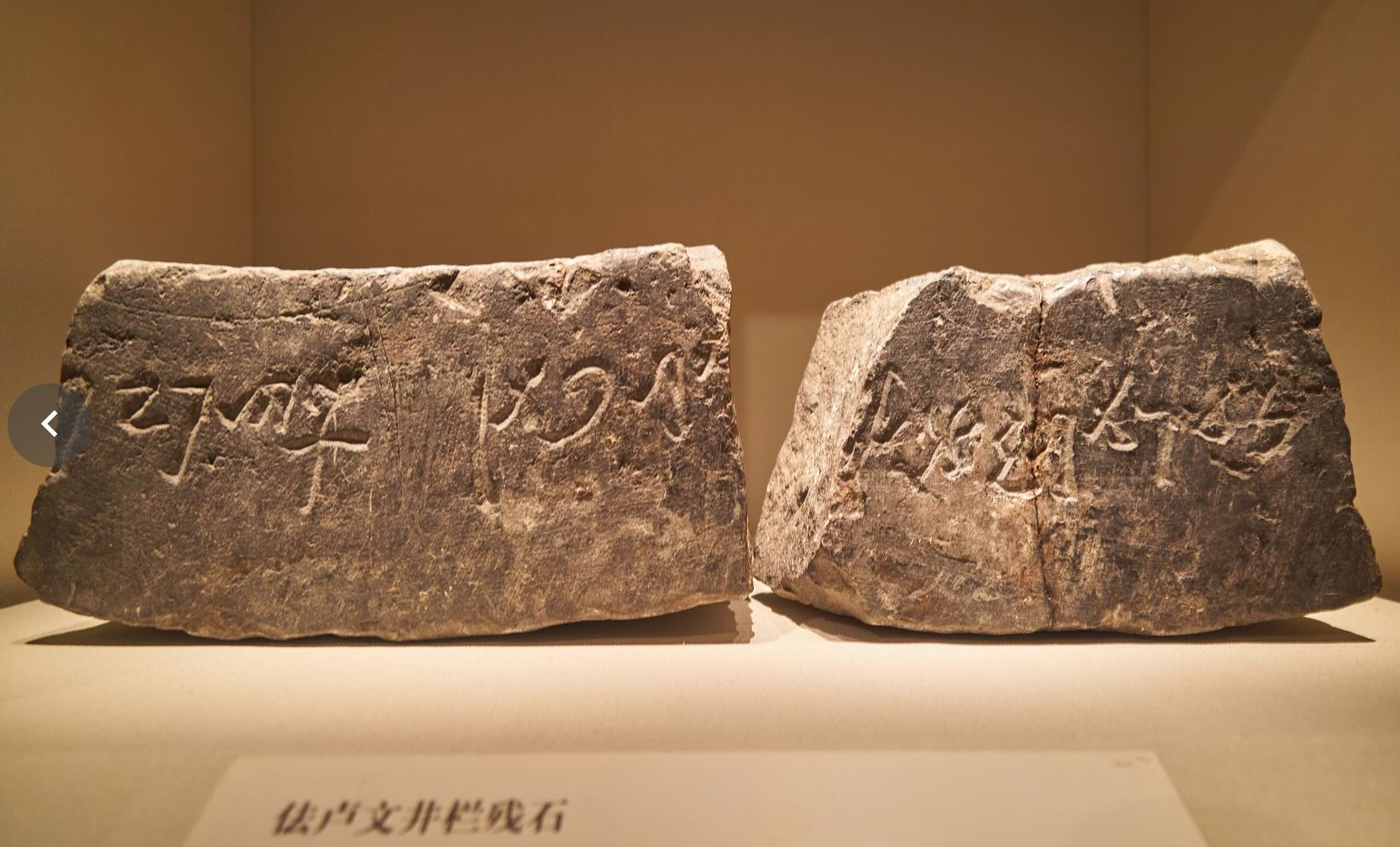 洛陽佉盧文井欄殘石